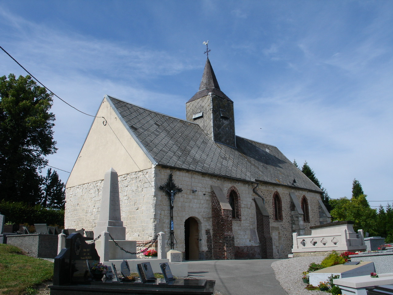 Église de Bainghen